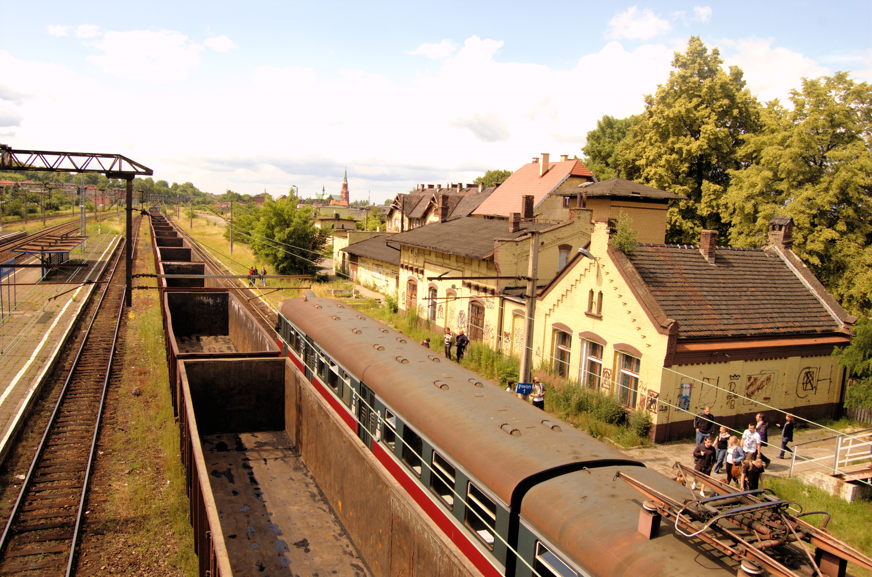 Tour de Wongiel. Wycieczka kolejowa po terenach przemysłowych Górnego Śląska.